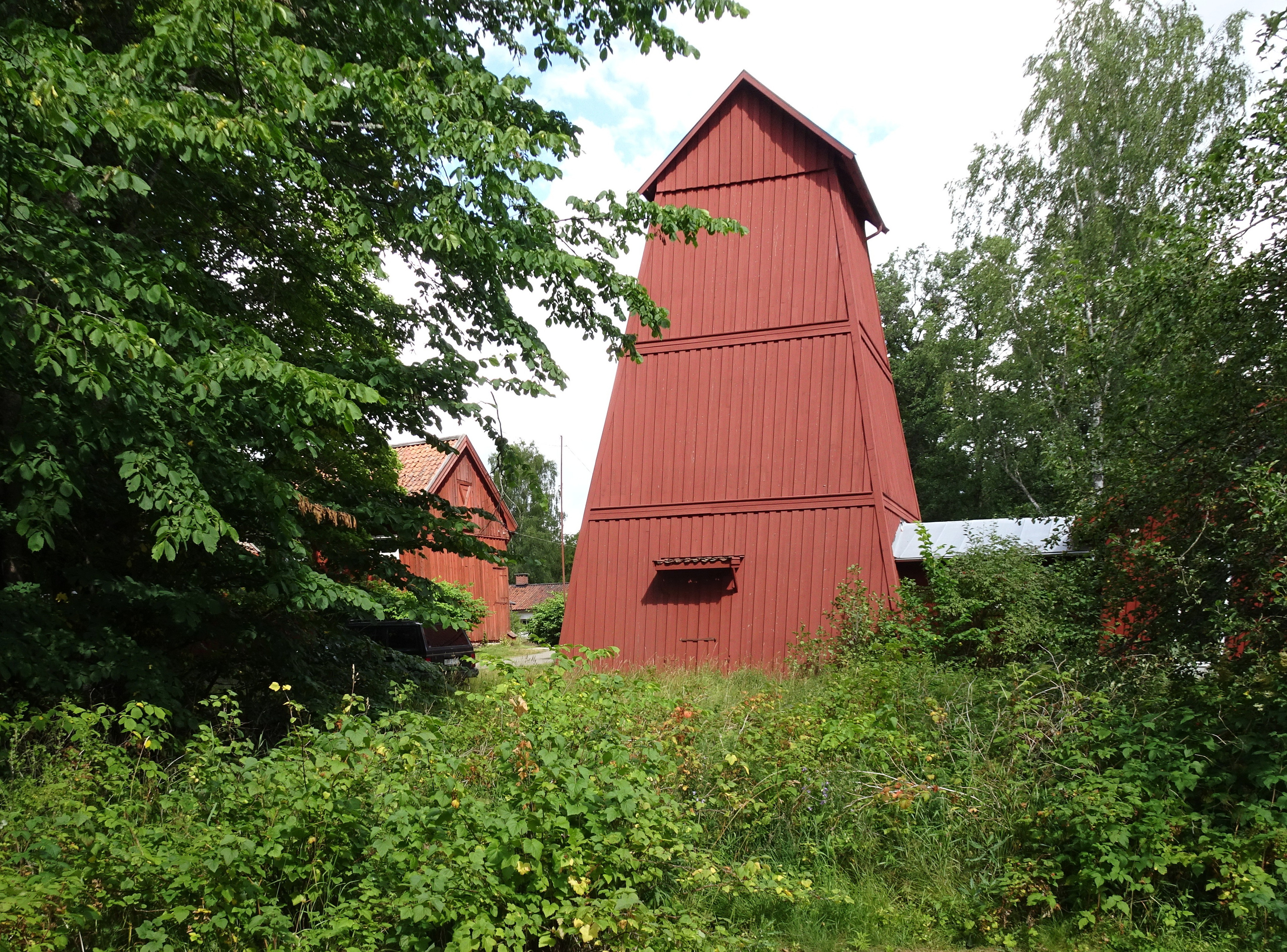 Skottvågns gruva